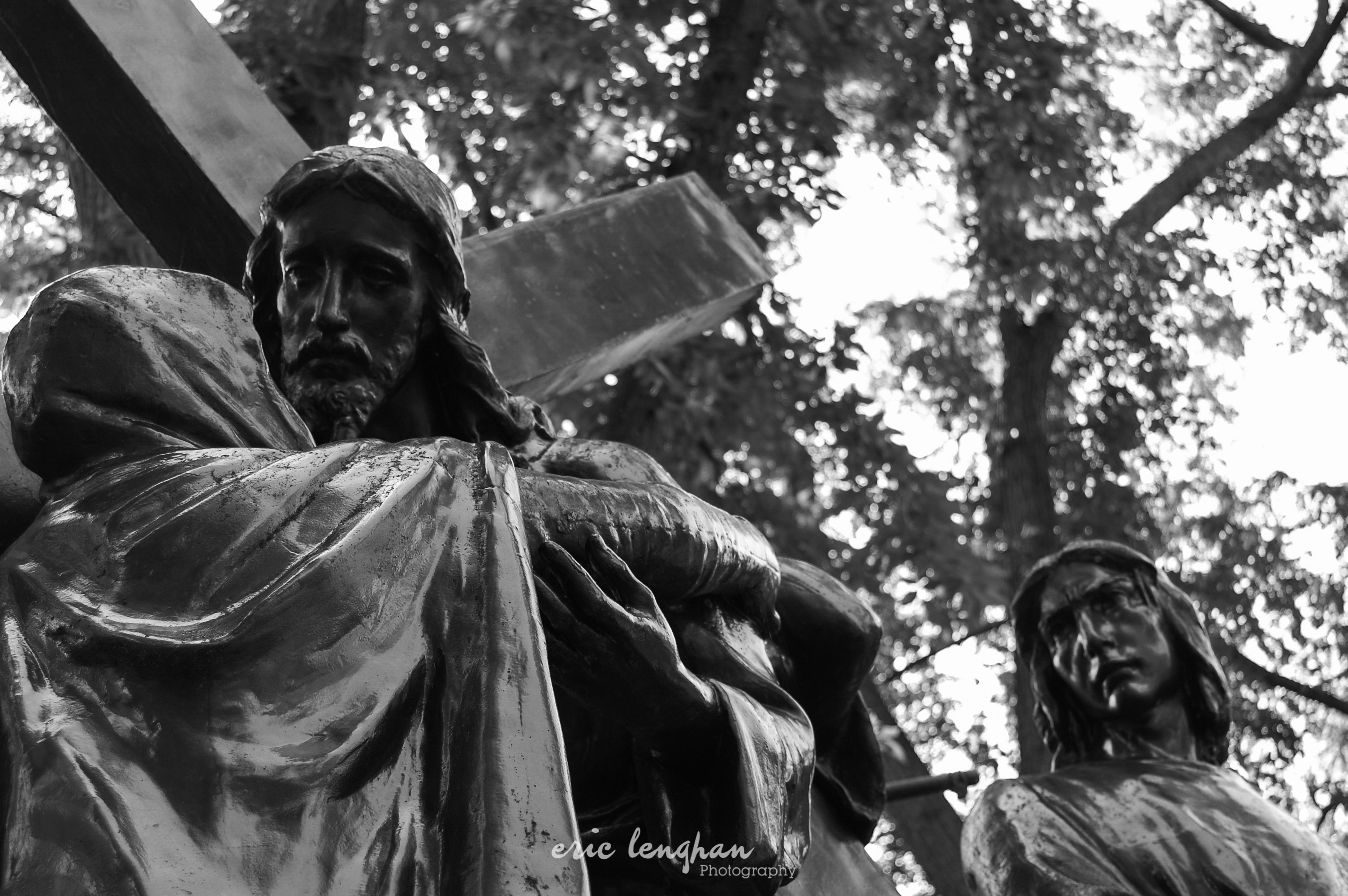 Jesus Baring His Cross Trois-Rivières, Québec.